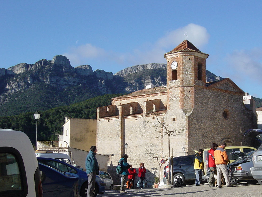 L'església de Colldejou. Al fons la serra de Llaberia (el Cavall Bernat i la Miranda -919m-).